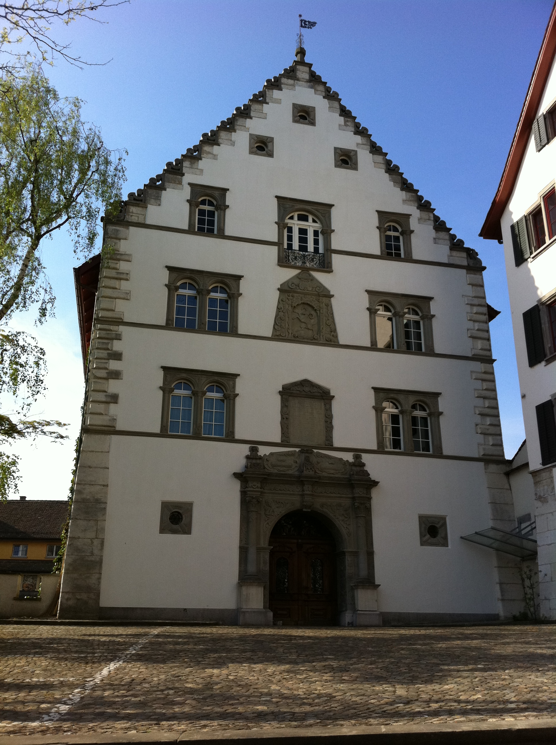 Vieil arsenal (maison du gouvernement), Schaffhouse